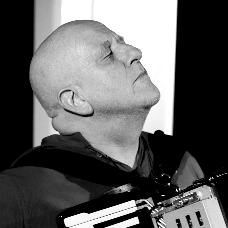 Manfred Leuchter in Schömberg, 2012